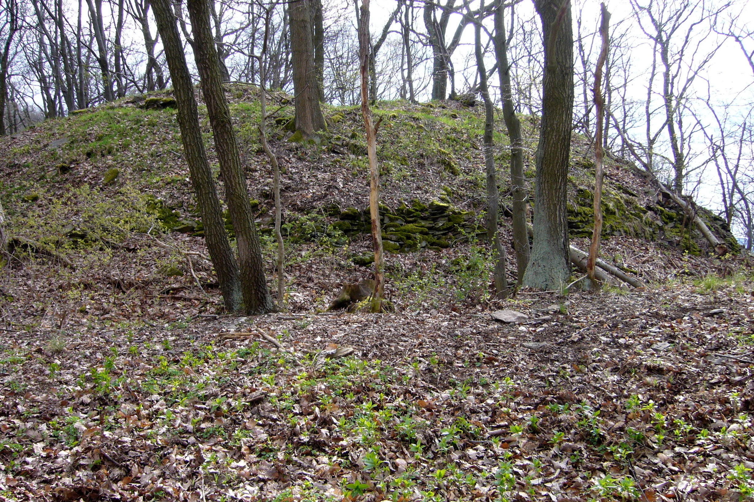 Kalich – torzo bašty předsunutého opevnění